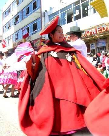 Anaco: "urku" rojo, es una vestimenta femenina originaria del distrito de Camilaca. Vestimenta camilaqueña declarada Patrimonio Cultural Inmaterial del Perú, declarado por el Instituto Nacional de Cultura y el Ministerio de Cultura del Perú en el 2009.